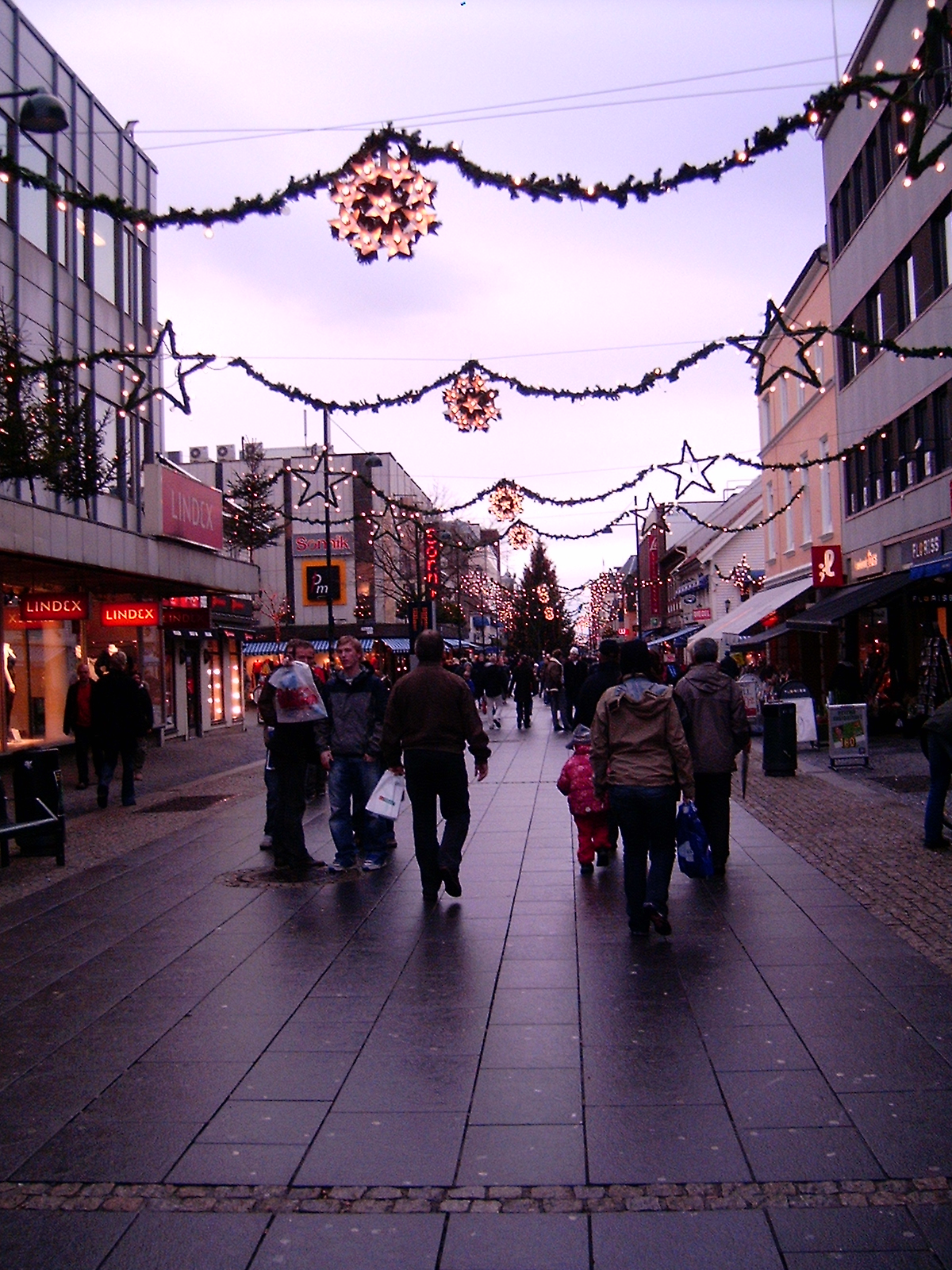 Markens gate før jul